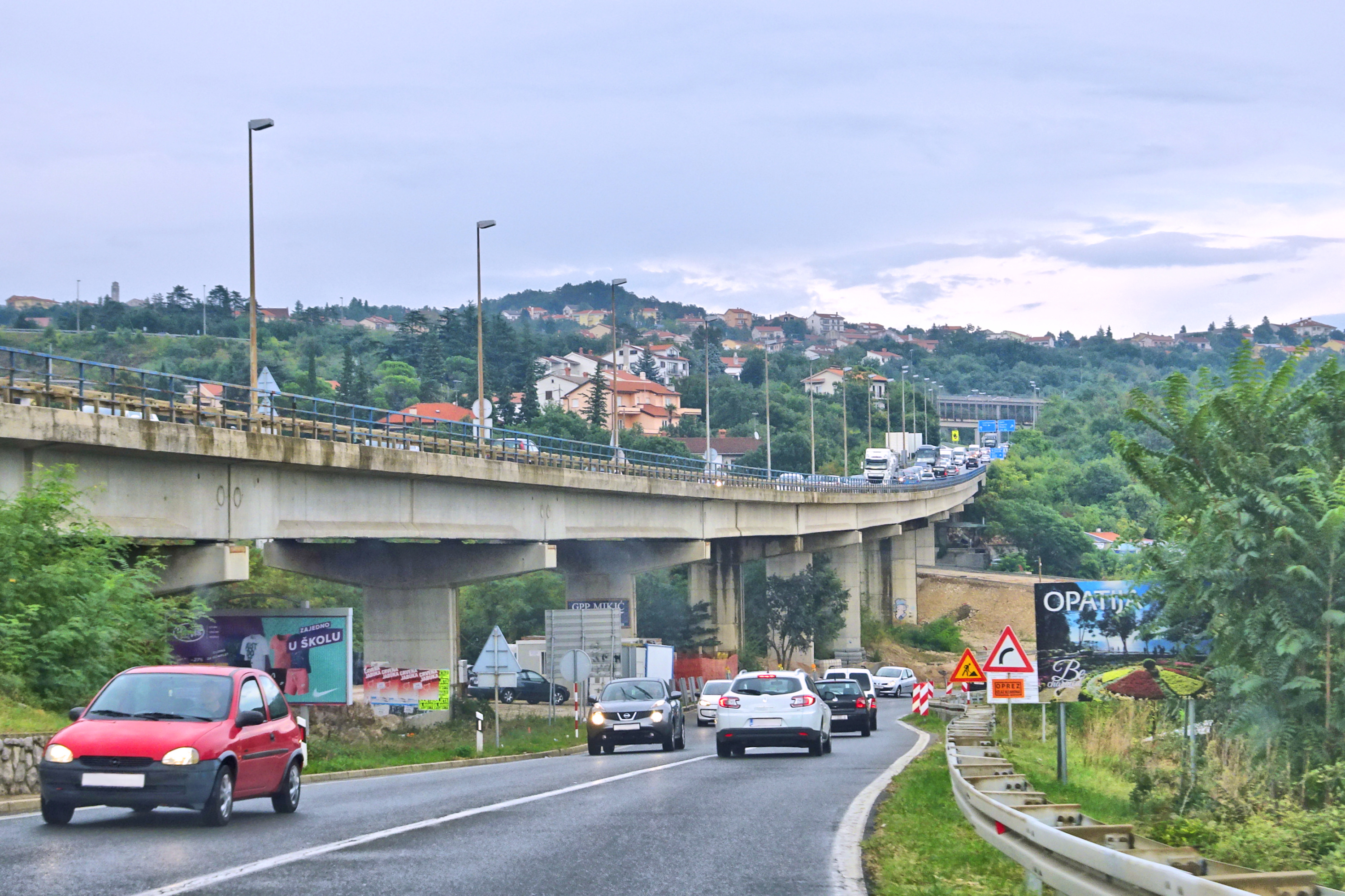 Matulji, Croatia